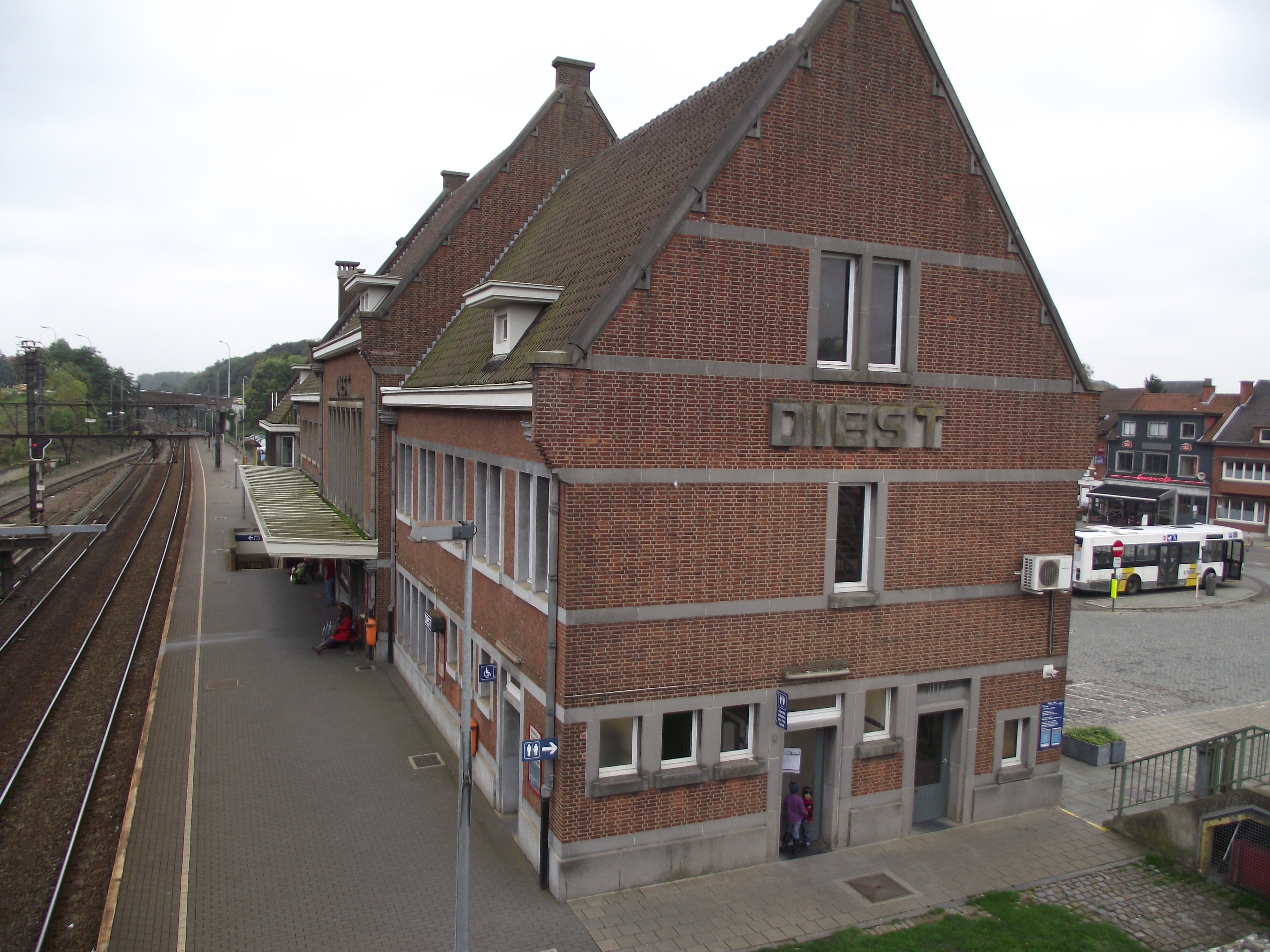 Station Diest gefotografeerd vanuit de loopbrug.